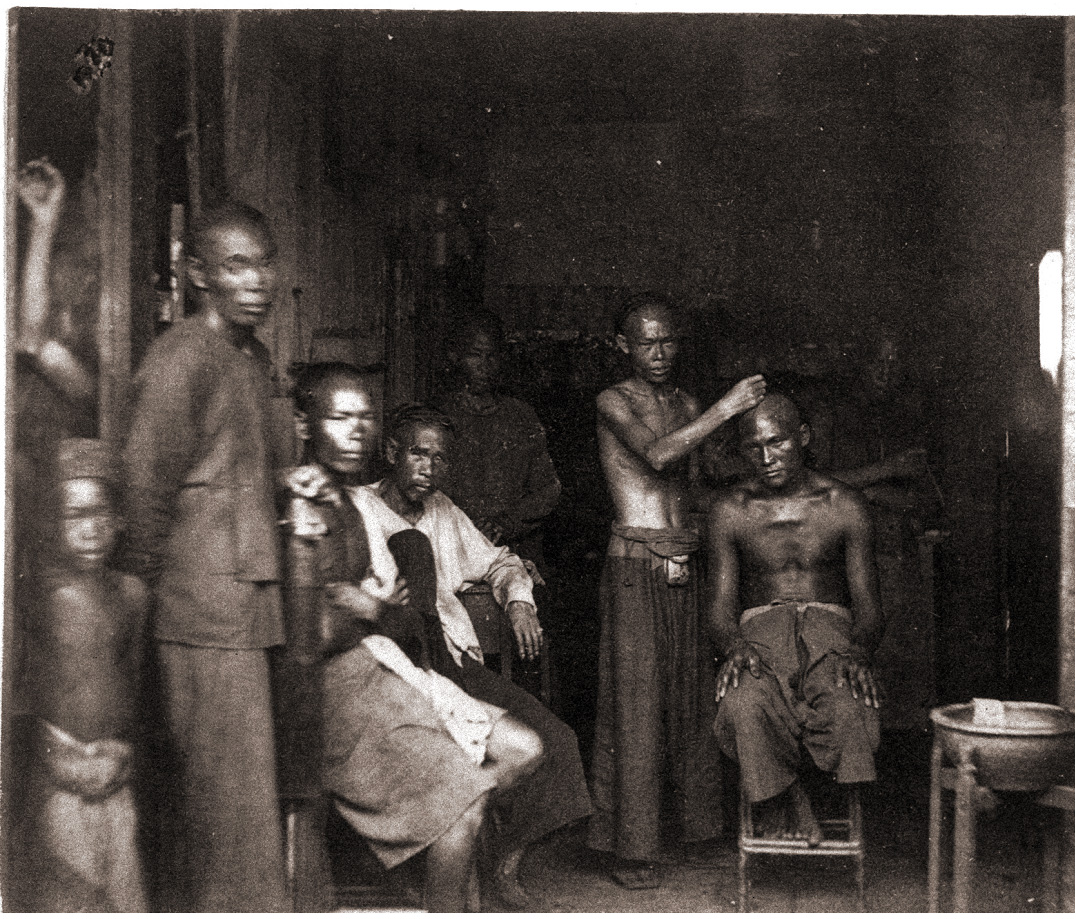 Foto. Interieur van een Chinese kapperzaak in Batavia